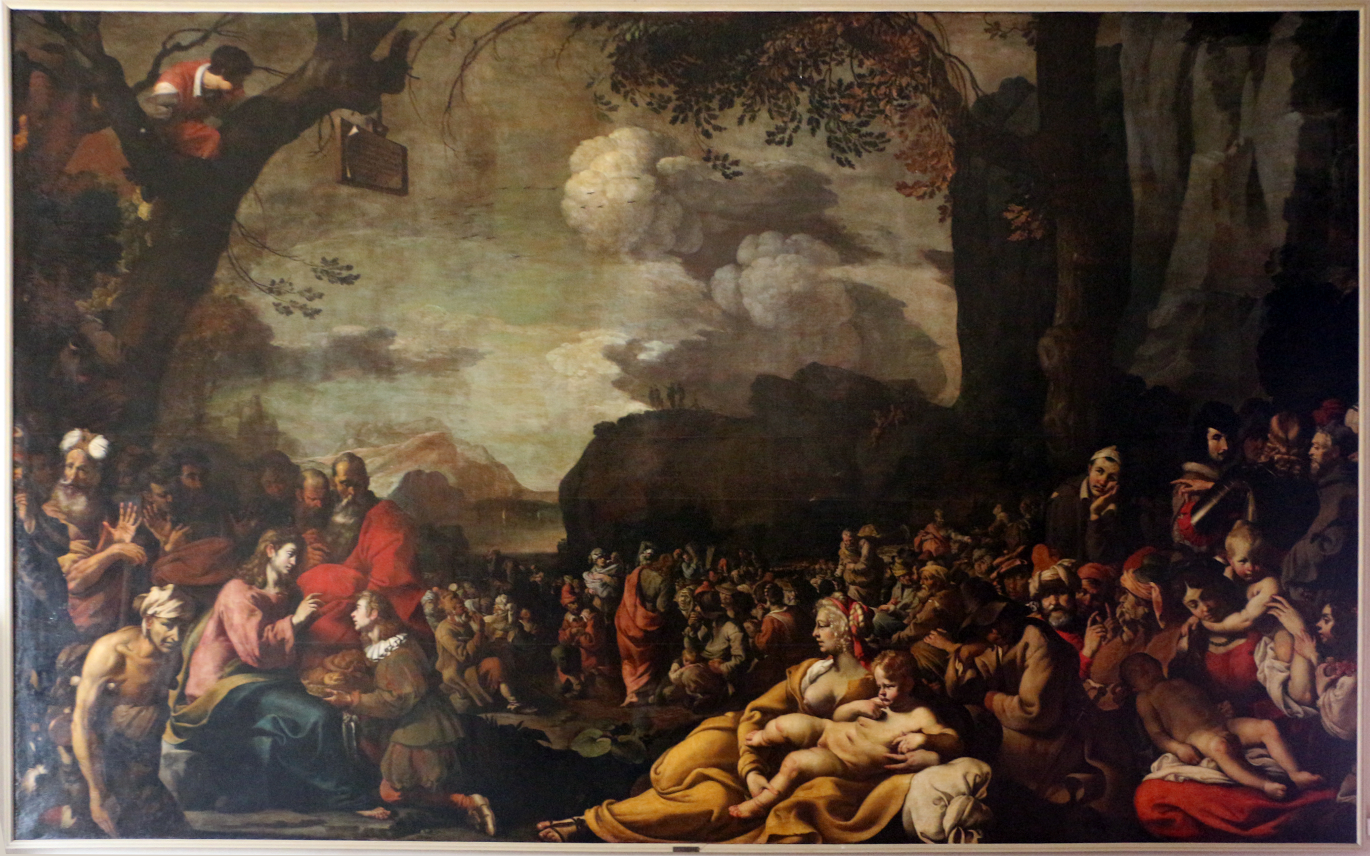 Palazzo Comunale This is a photo of a monument which is part of cultural heritage of Italy.